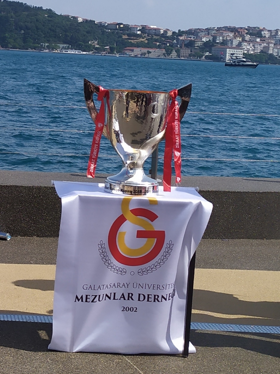 2018-2019 sezonu Ziraat Türkiye Kupası sahibi Galatasaray SK